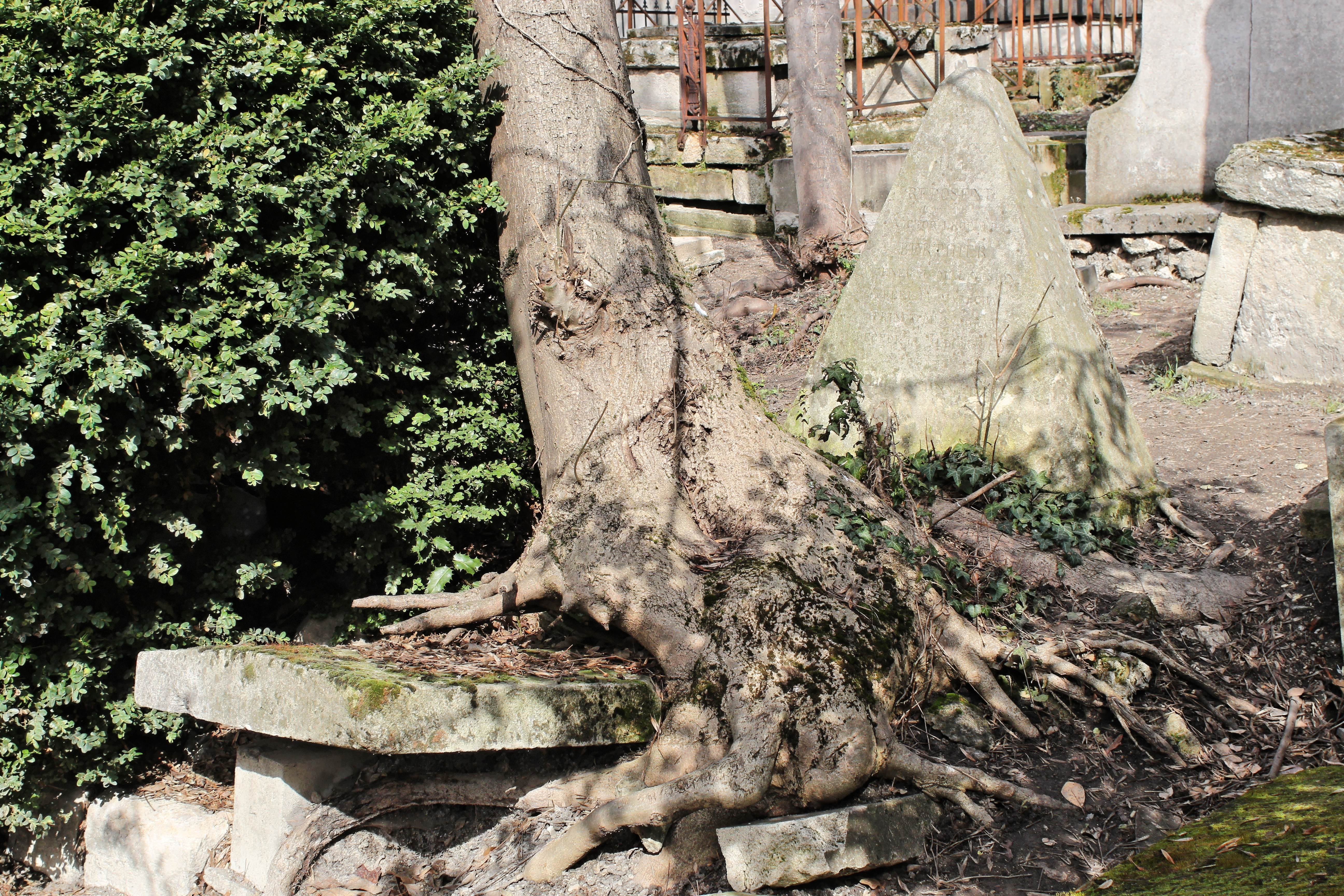 Sépulture de Victor Léopold Berthier (1770-1807), général de la Révolution et de l'Empire ; sa seconde épouse Jeanne-Ursule Bonnemant (1770-1813) ; son frère Joseph-Alexandre Berthier (1792-1849), maréchal de camp ; et la vicomtesse Alice Bergès (1840-1866), épouse d'Alexandre-Léopold Berthier.